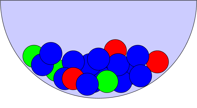 Ballenbak in Lingo tijdens hoofdronde